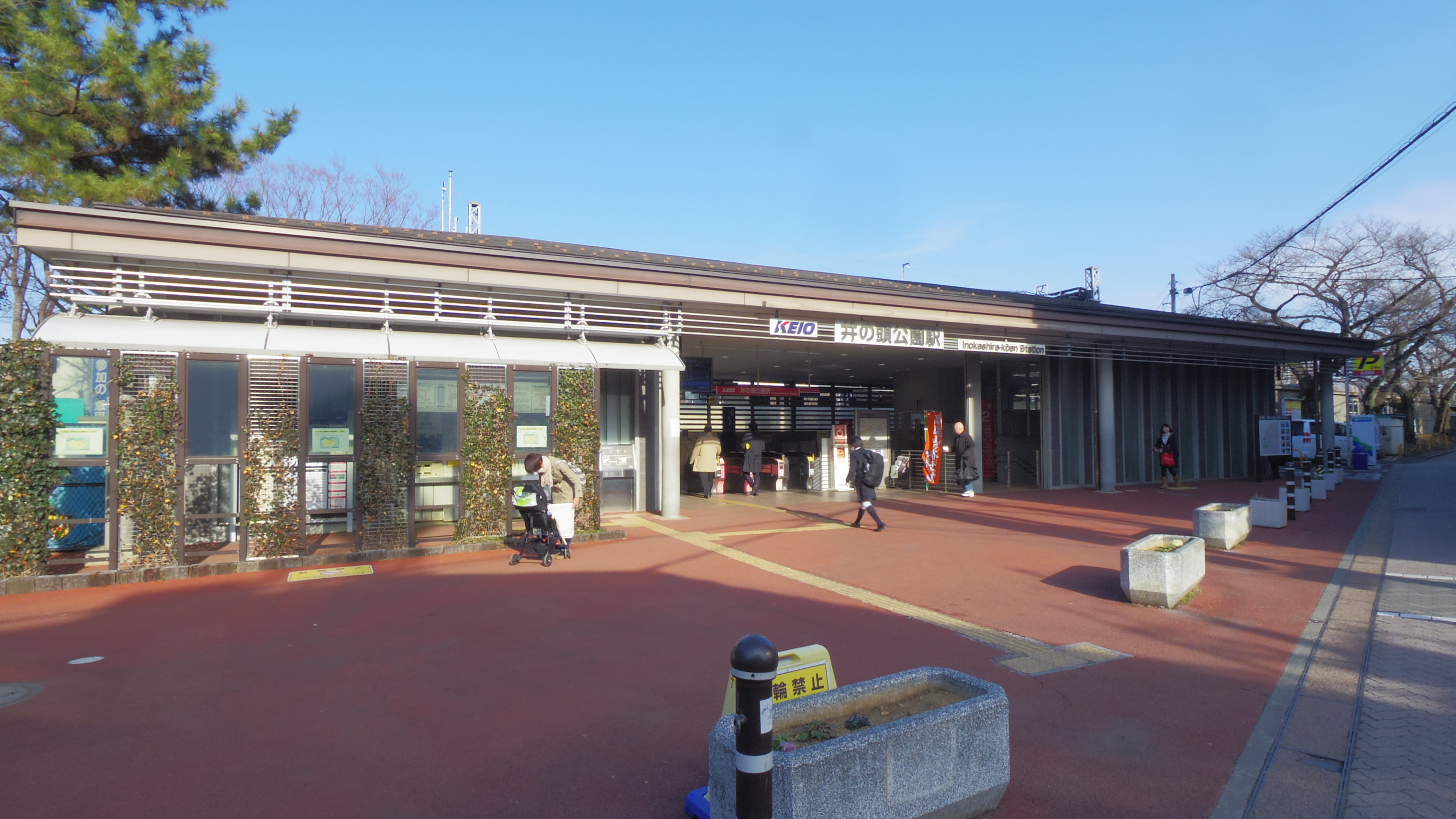 京王井の頭線井の頭公園駅